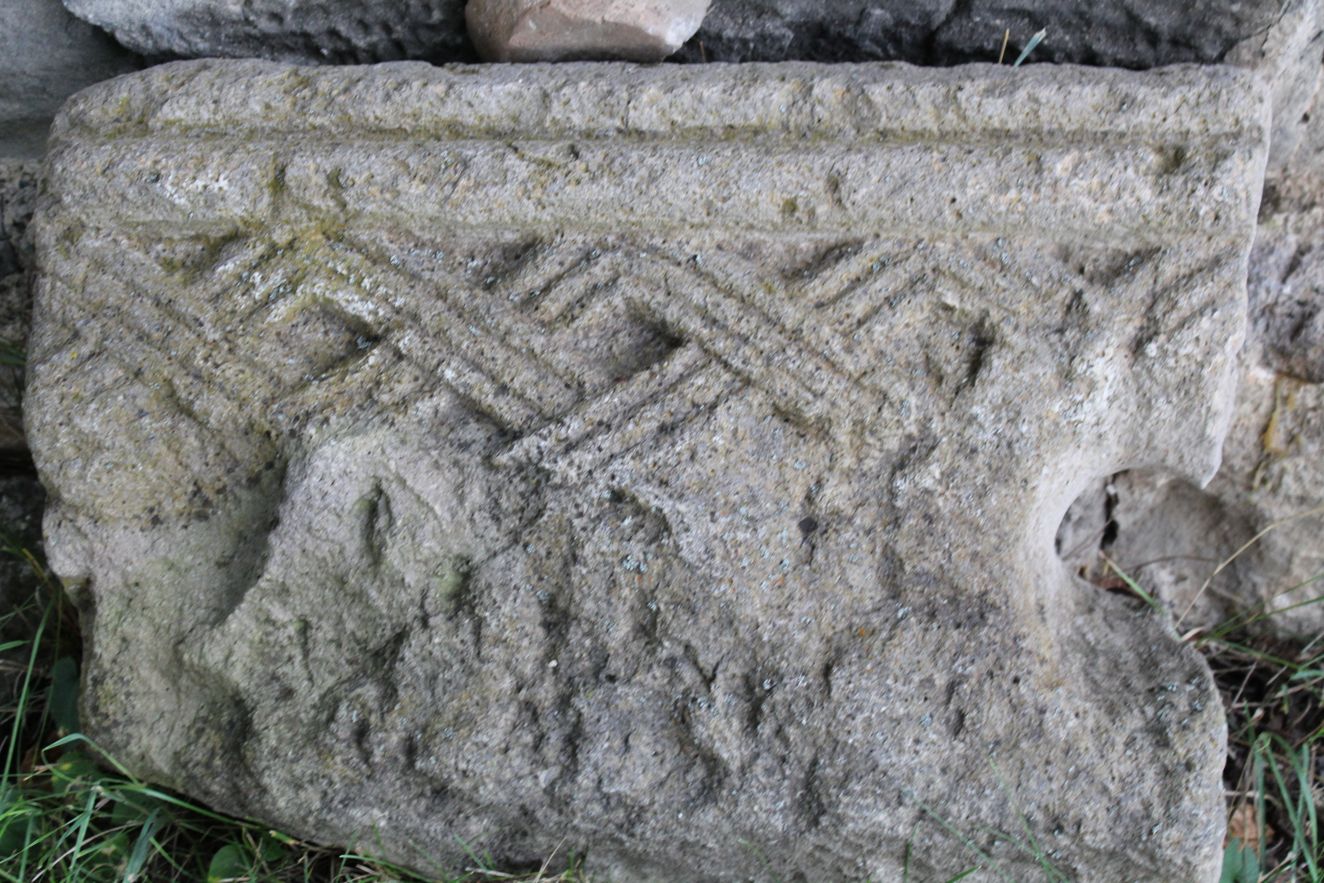 წყორძის დარბაზული ეკლესია